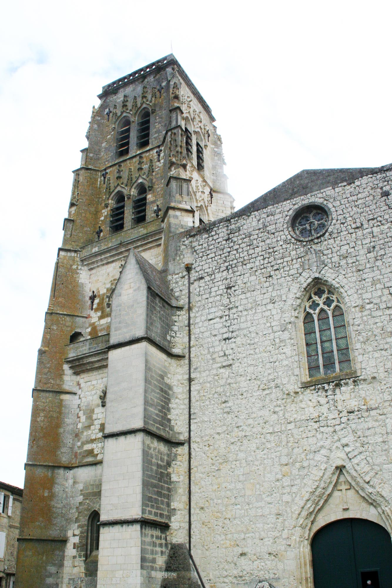 Façade et clocher, Cathédrale Saint-Gervais-Saint-Protais de Lectoure (Gers, France)